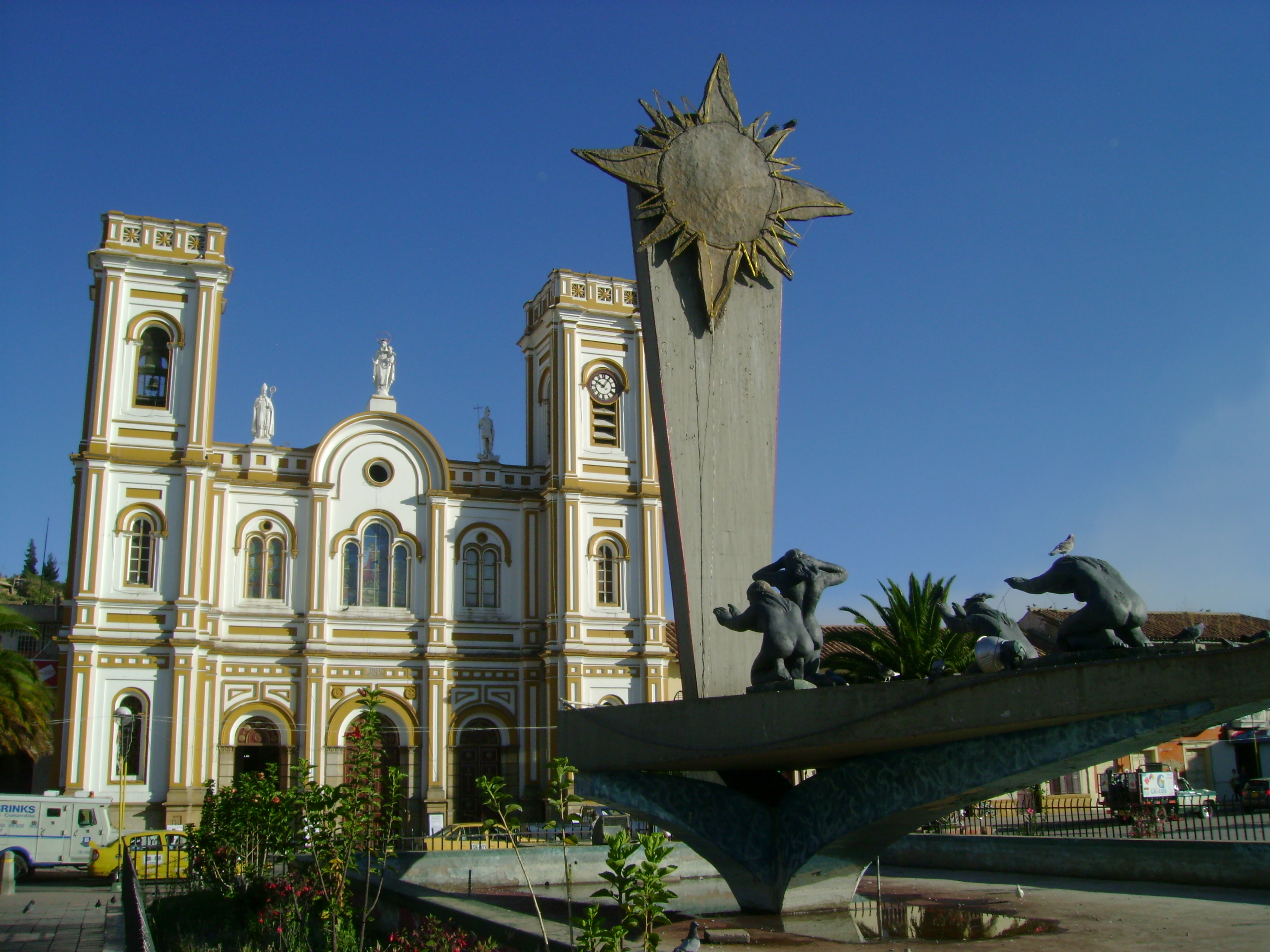 Parque principal de Sogamoso